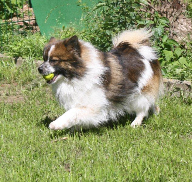 Deutscher Spitz Mittel gescheckt Friendly Malinako's